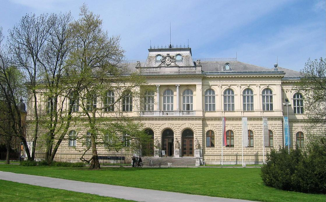 National museum, Ljubljana photo:Ziga 21:37, 27 April 2006 (UTC)